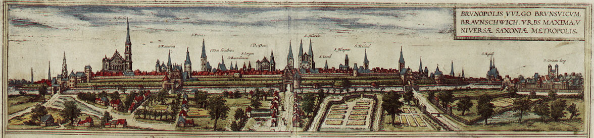 Braunschweig, Beischrift: BRVNOPOLIS VVLGO BRVNSVICVM, BRAVNSCHWICH; VRBS MAXIMA, VNIVERSAE SAXONIAE METROPOLIS, deutsch: „Brunopolis, volkstümlich Brunswik, Braunschweig, größte Stadt, Hauptstadt von ganz Sachsen“